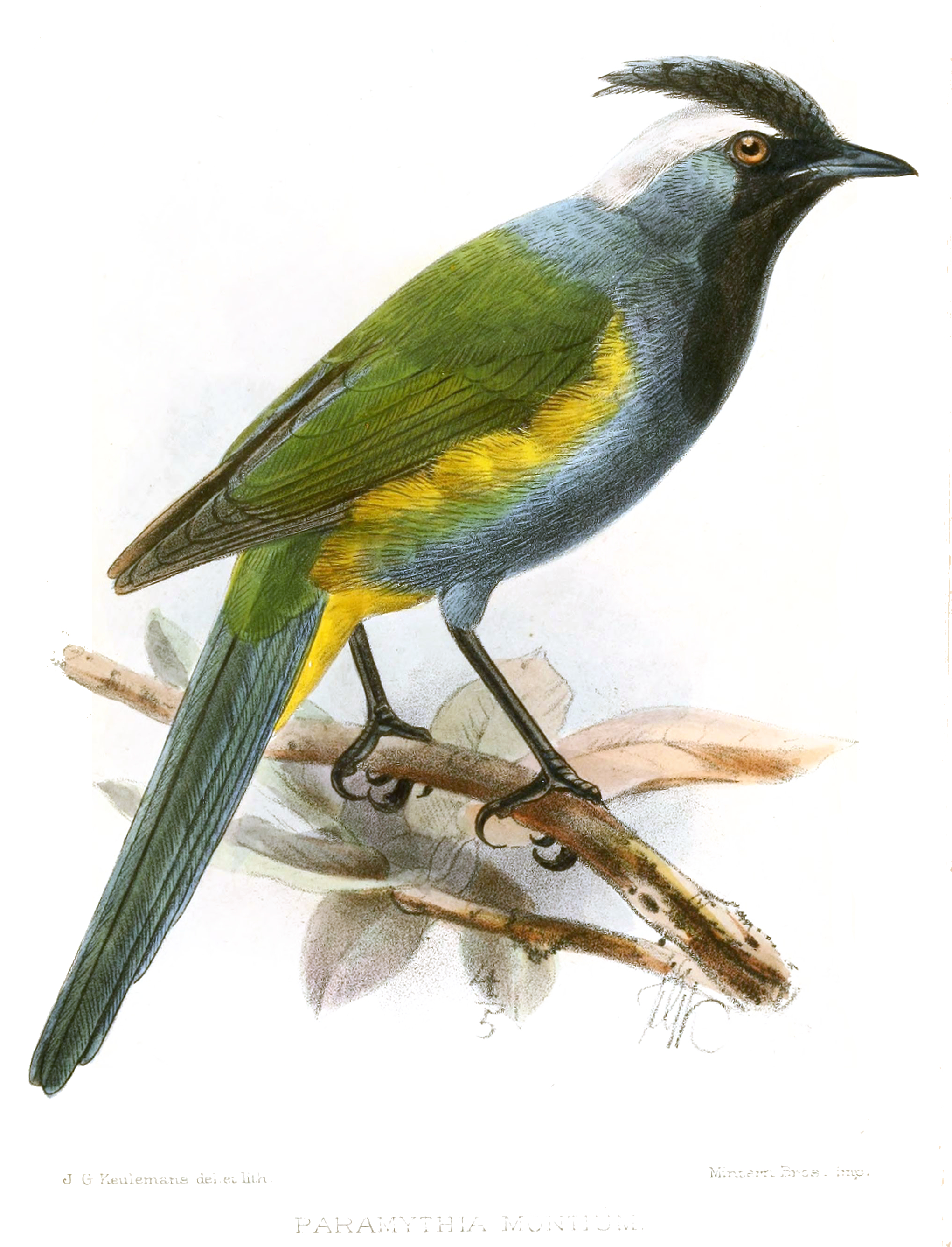 Paramythia montium